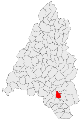 Categorie:Hărţi ale judeţului Bihor